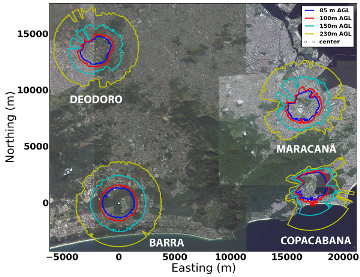 Áreas olímpicas cobertas pelo ALTAVE OMNI